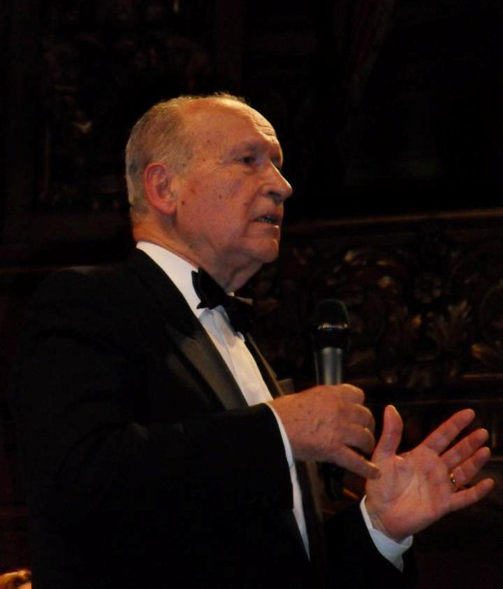 Maestro Roberto Saccente